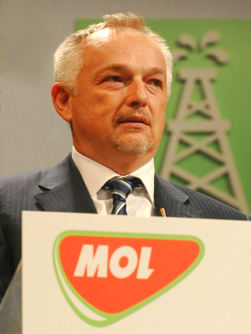 Hernádi Zsolt magyar üzletember, a MOL Magyar Olaj- és Gázipari Nyrt. elnök-vezérigazgatója